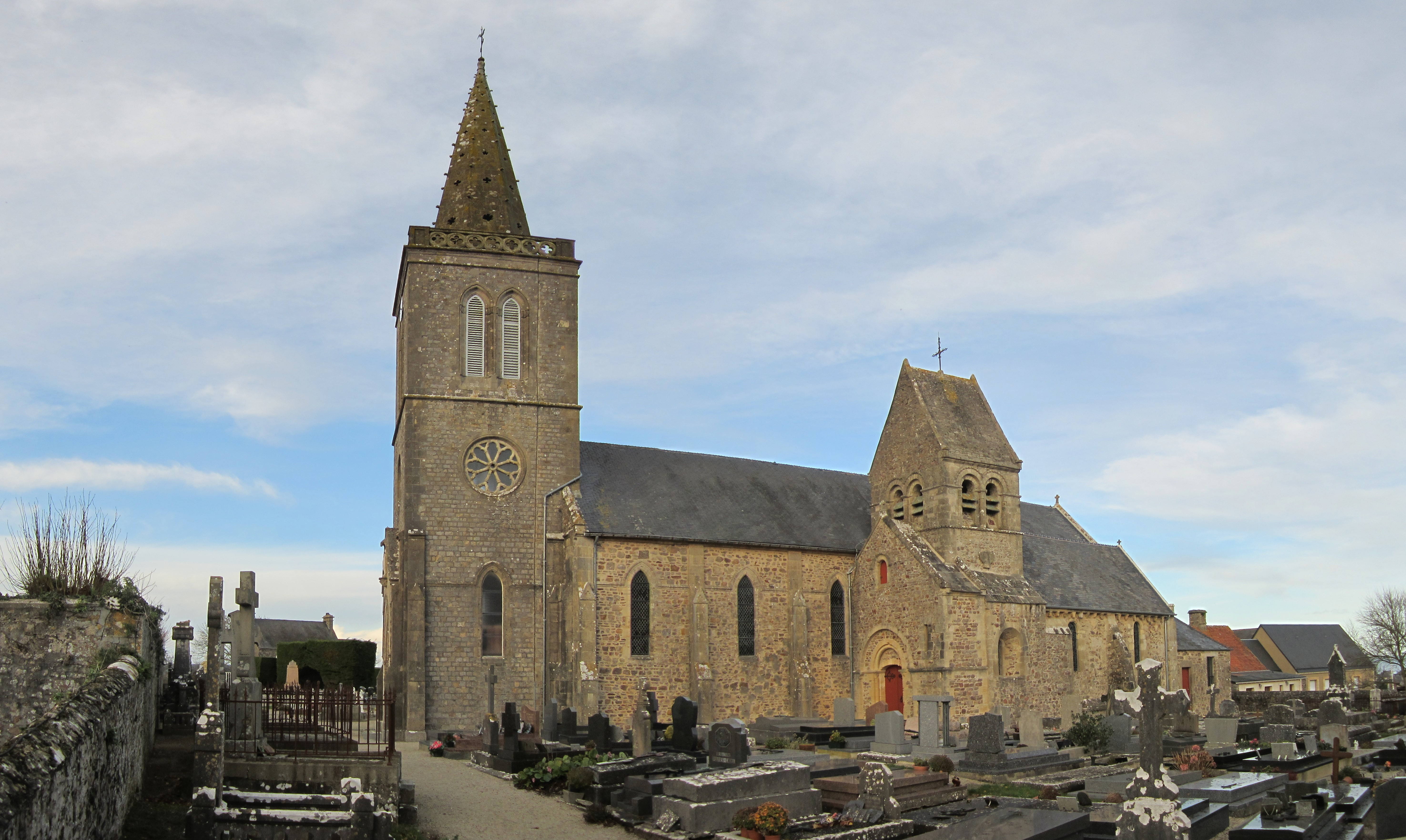 Église Notre-Dame de Quinéville, Manche